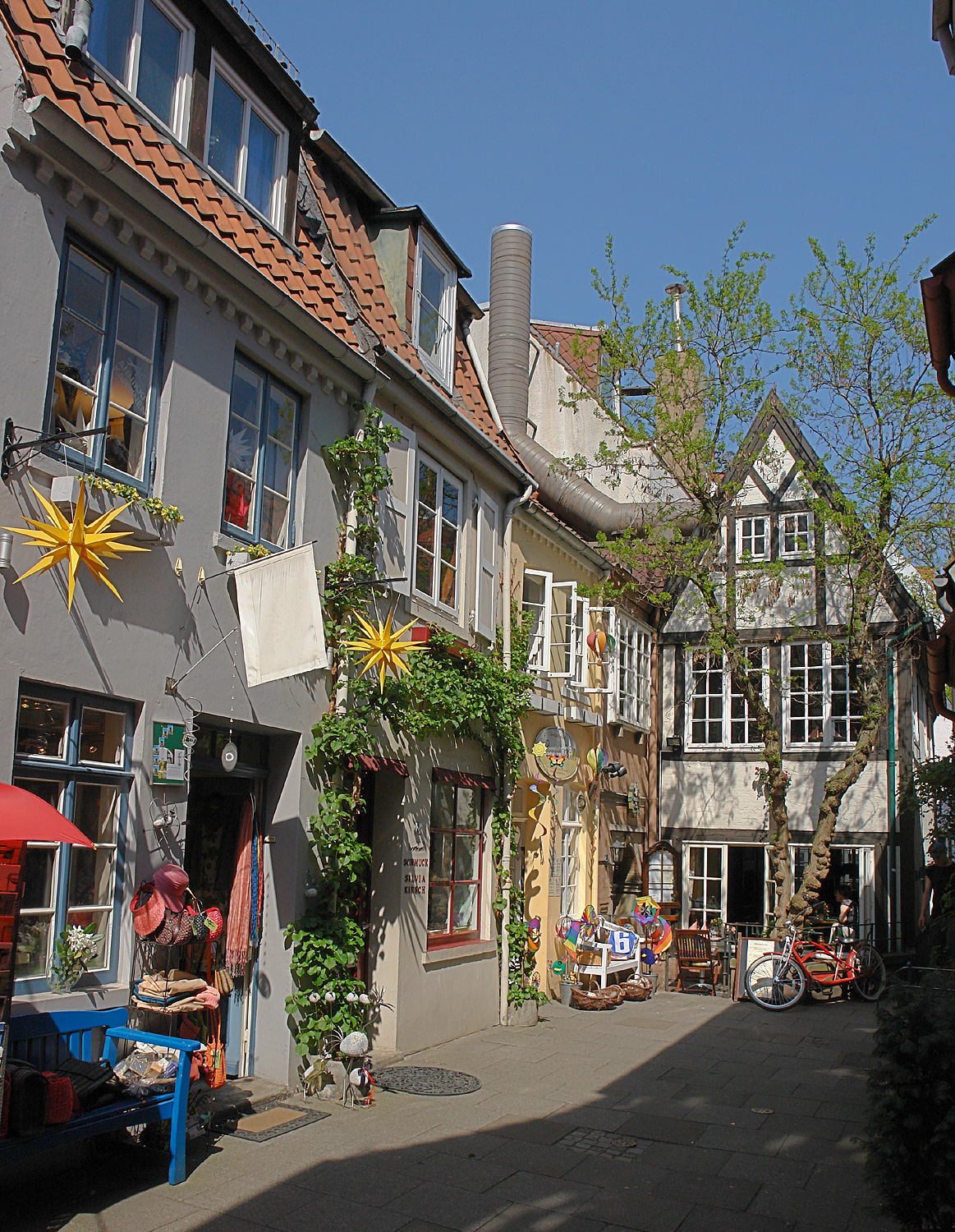 Wüstestätte im Schnoor (Bremen)Das abgebildete Objekt ist ein geschütztes Kulturdenkmal in der Freien Hansestadt Bremen, mit der Nr. 1377 beim Landesamt für Denkmalpflege registriert.